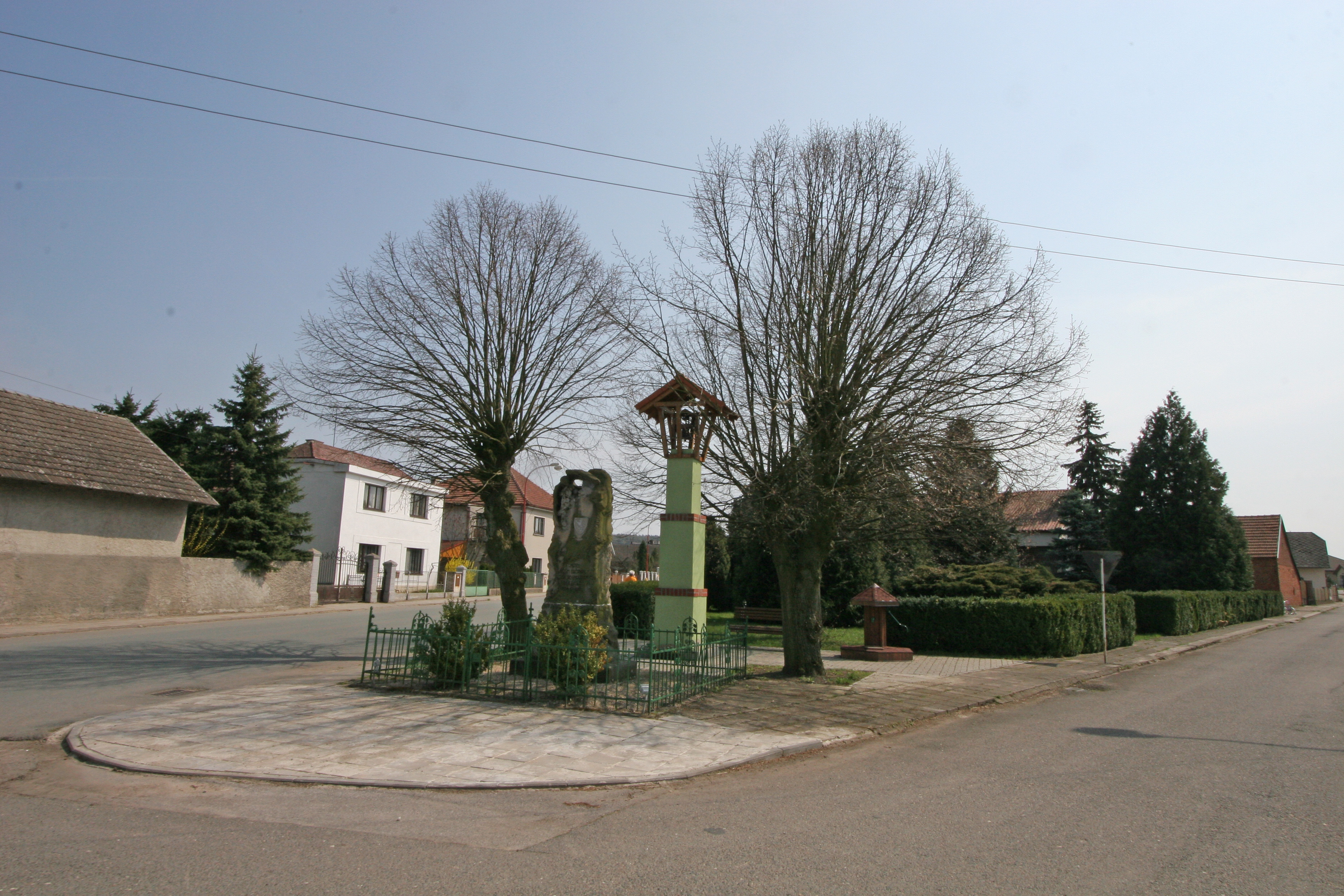 chudeřice zvonička a pomník padlých